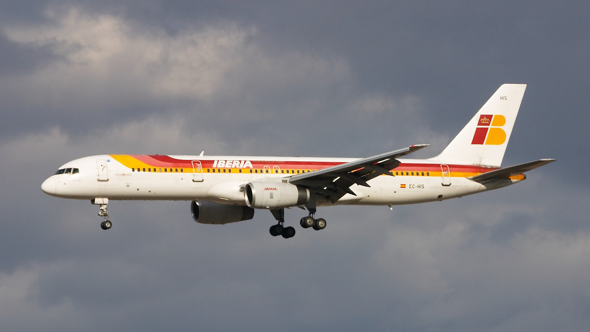 Boeing 757-256 de Iberia a punto de aterrizar en la pista 33 del aeropuerto de Madrid Barajas.